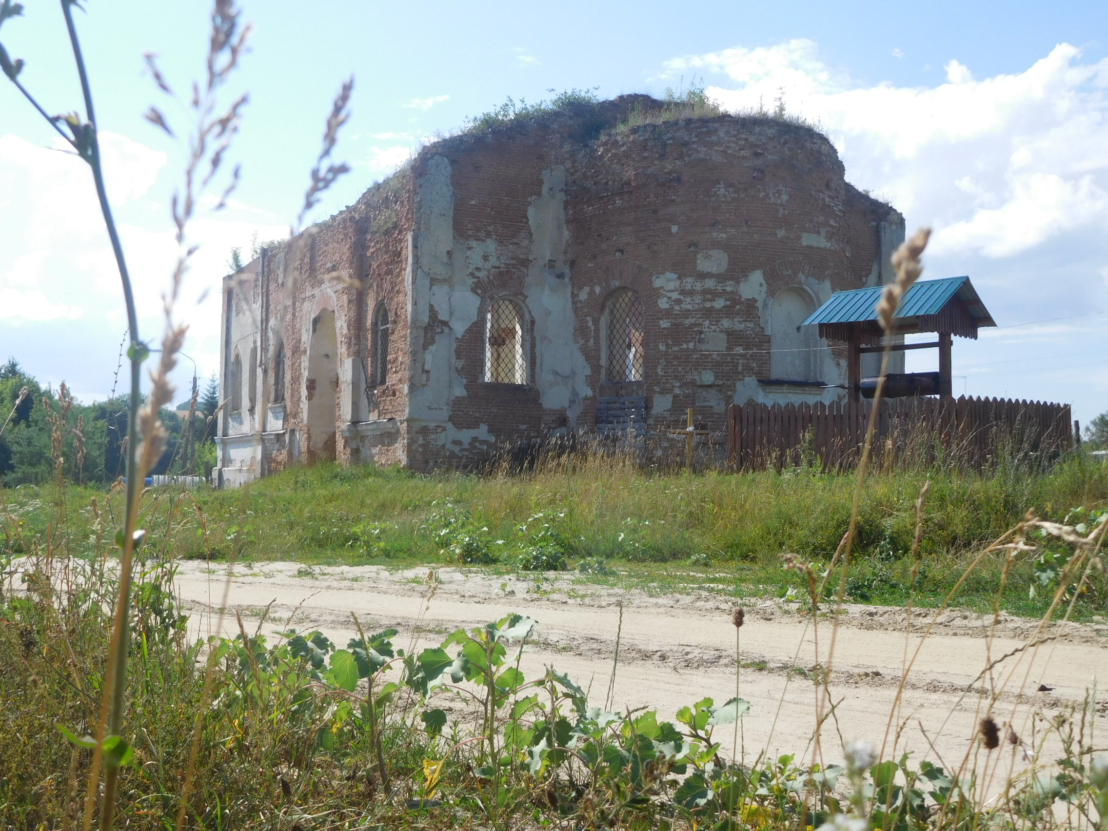 Битиця. Церква Олександра Невського (мур.)